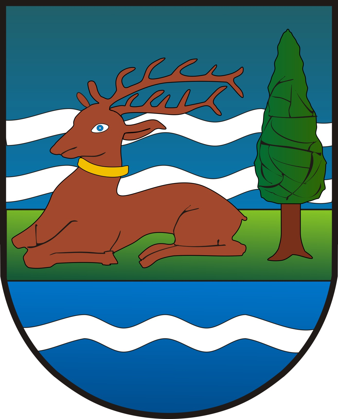 Grb Srema